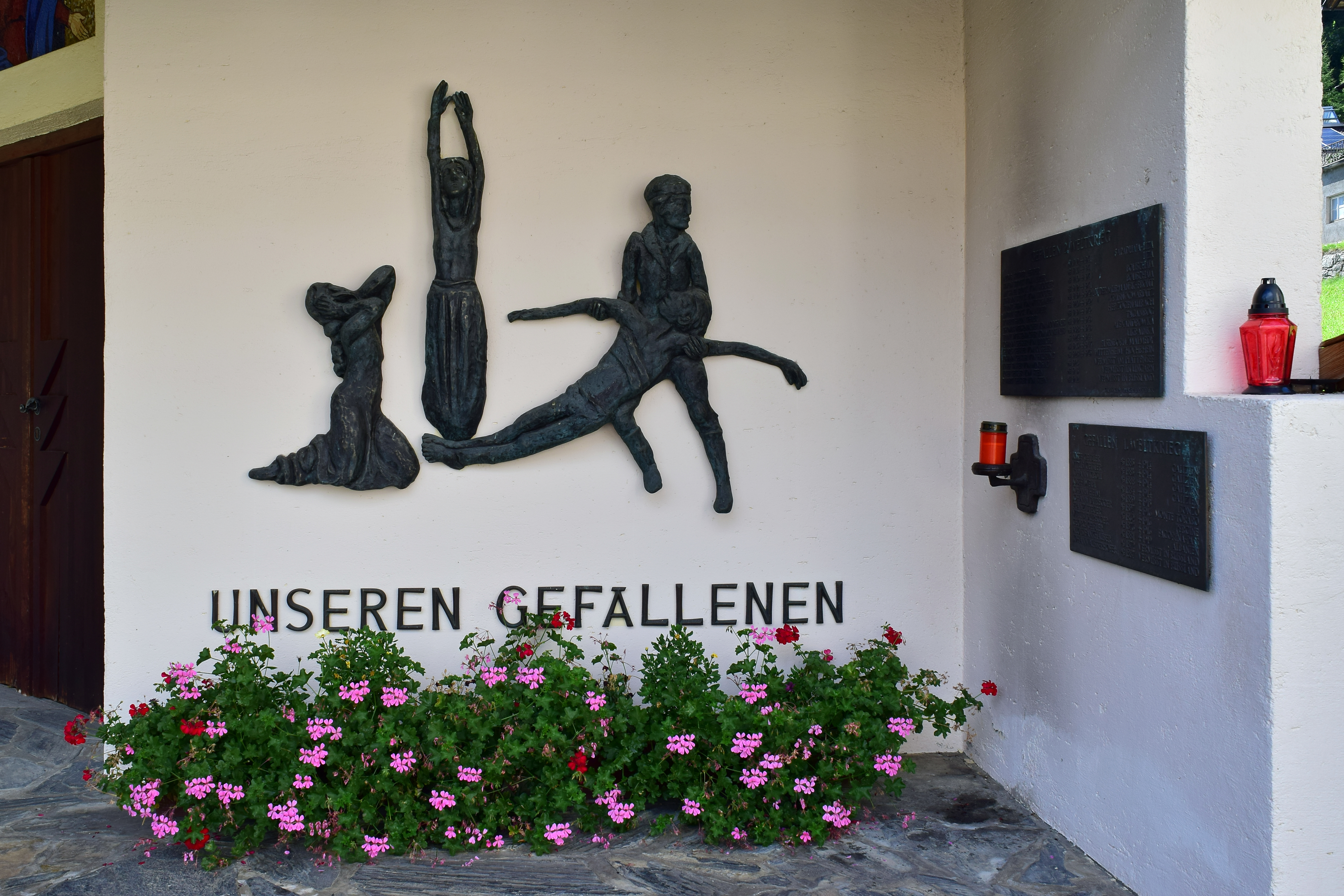 Kriegerdenkmal an der Friedhofskapelle in Brandberg